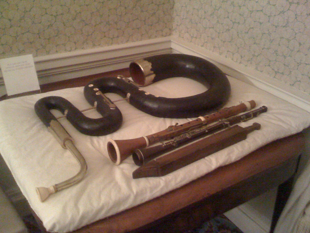 Herschel's horn